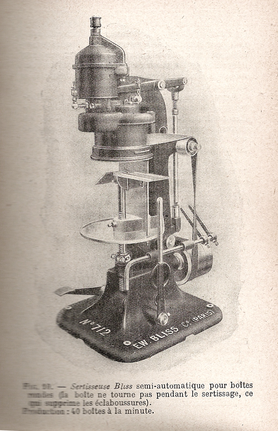 Machine à sertir les couvercles de boite de conserve. D'après l'exemplaire du livre à la Bibliothèque de la Gourmandise, Hermalle-sous-Huy, Belgique.